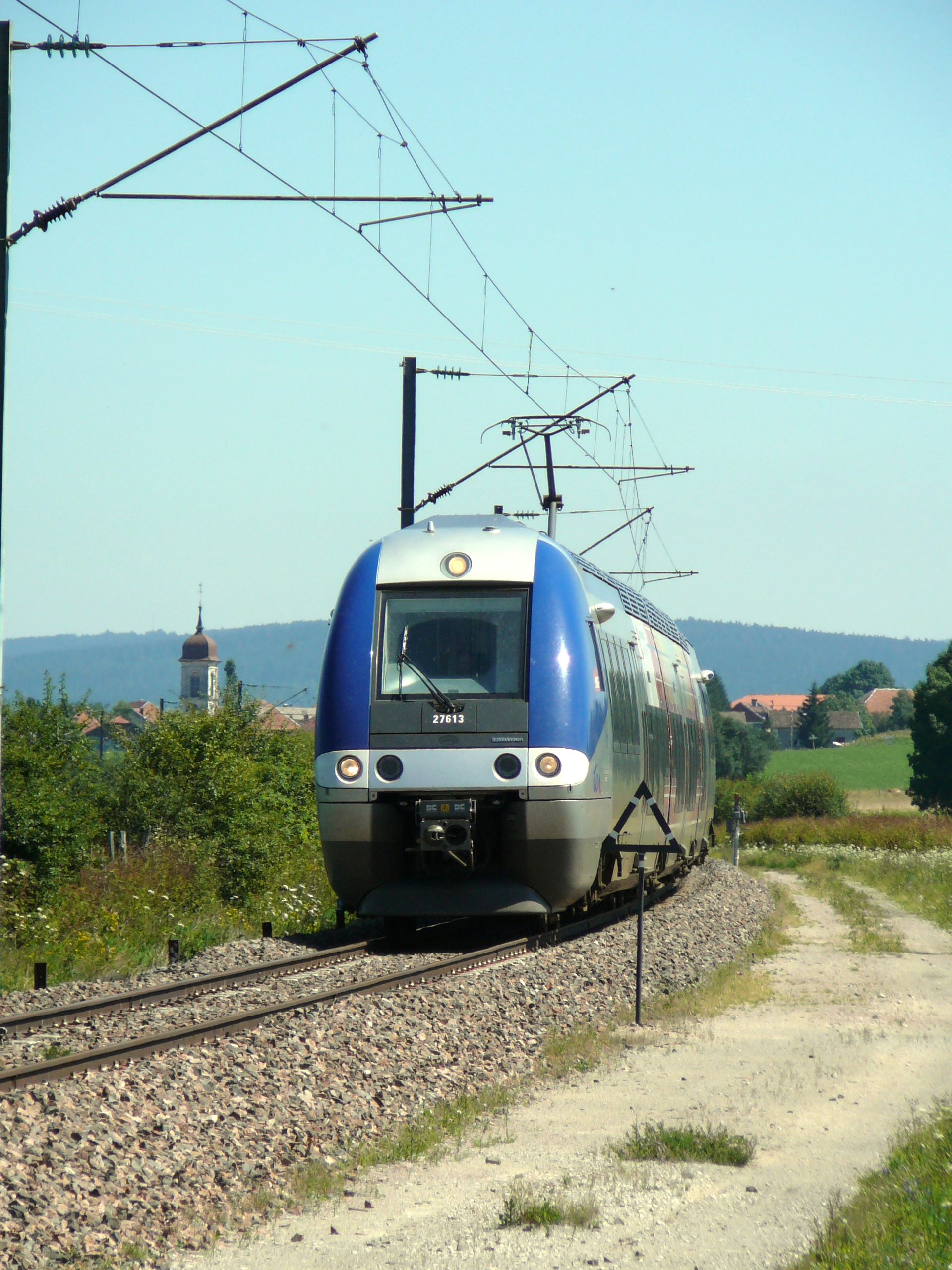 Z27613 (série SNCF Z 27500) à Sainte Colombe (Doubs)